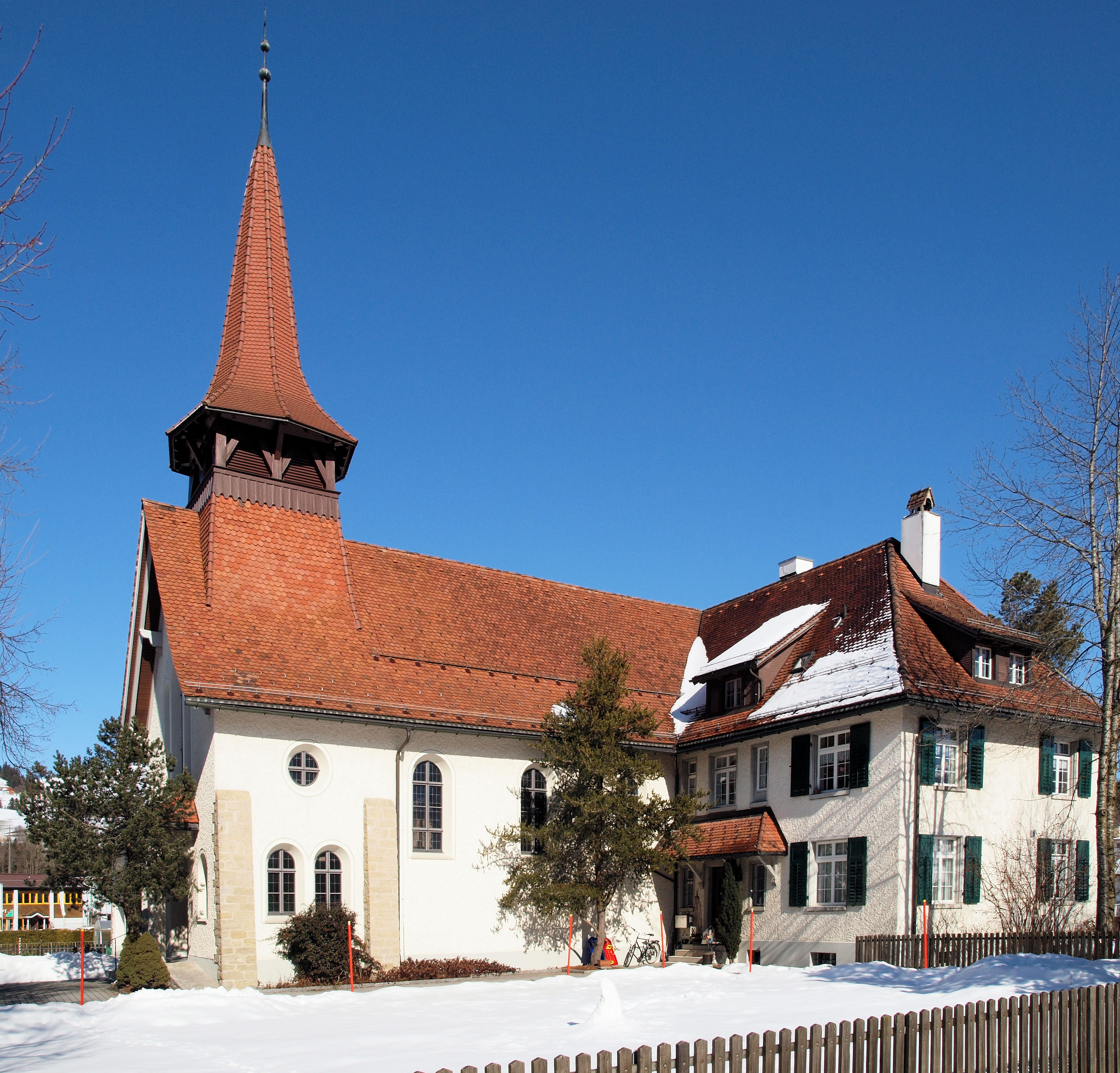 Die Reformierte Kirche von Appenzell, mit angebauten Pfarrhaus. Erbaut zwischen 1908 und 1908 noch den Plänen von 1907 von Emmanuel La Roche und Adolf Stählin.